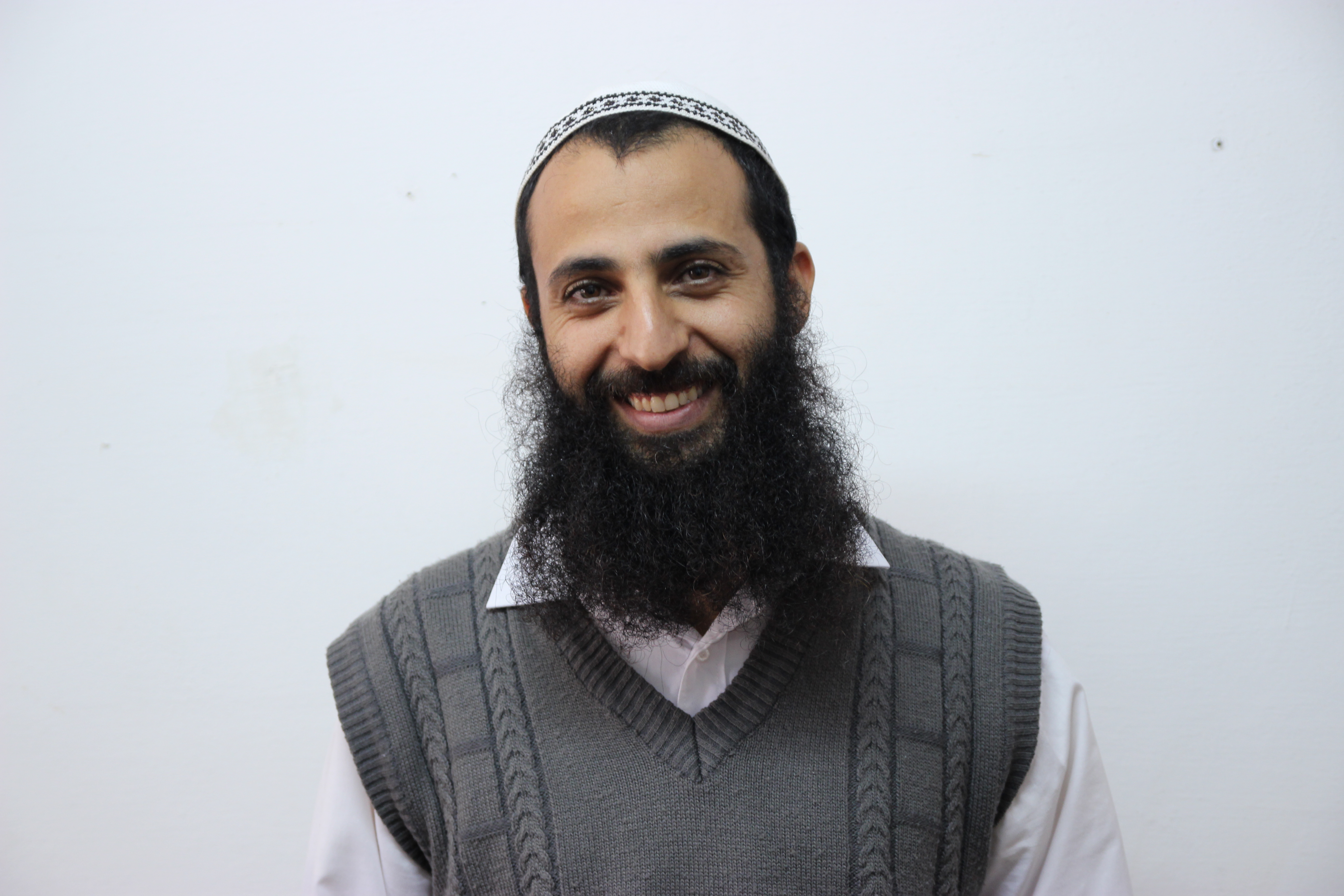 ראש הישיבה